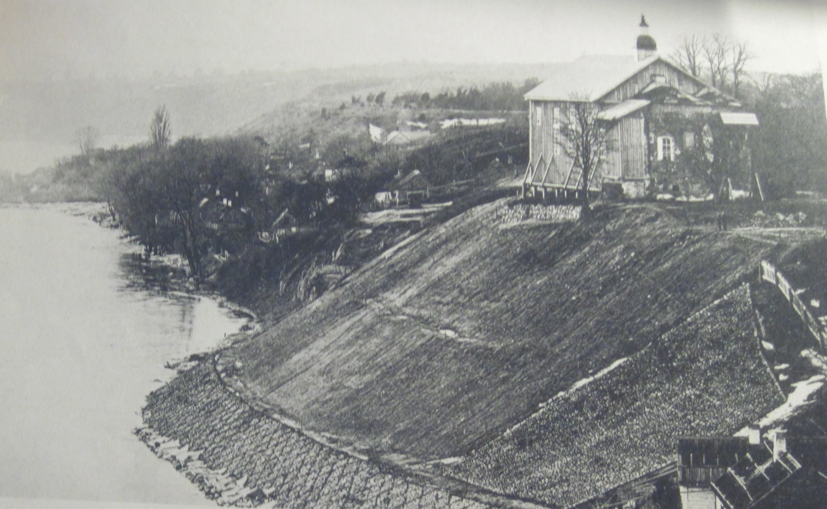 Выгляд Каложскай царквы ў Гродне пасля ўмацавання берага Нёмана This is a photo of Belarusian heritage monument. Reference number: 410Г000004 ( WLM)